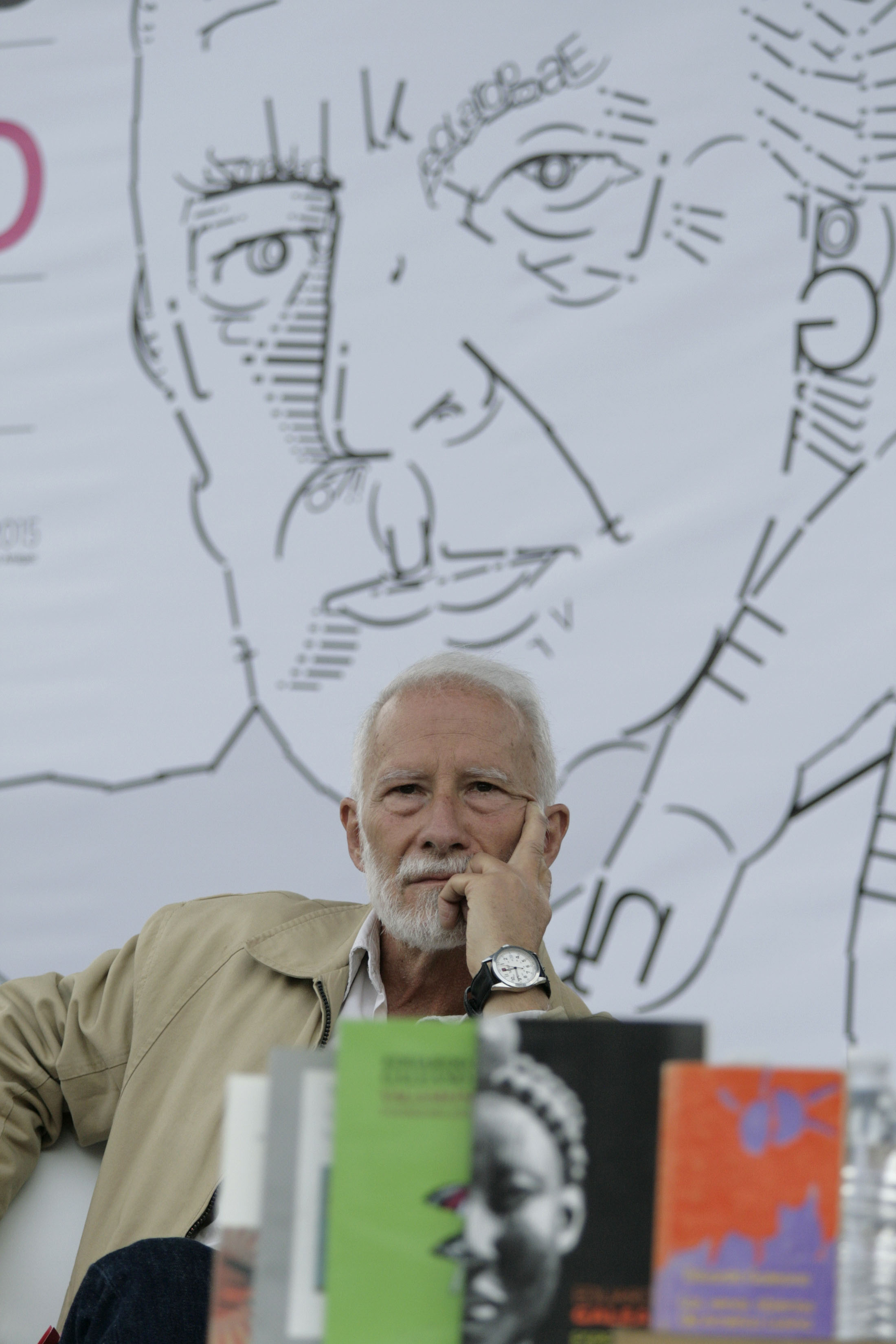 Domingo, 23 de Mayo de 2015. Rinden homenaje al escritor Eduardo Galeano, La palabra de los abrazos, en la Feria de las Culturas Amigas; participaron: el escritor Eduardo Milán, la periodista Blanche Petrich y el Secretario de Cultura, Eduardo Vázquez Martín. Foto: Abril Cabrera A. / Secretar’a de Cultura Ciudad de México.